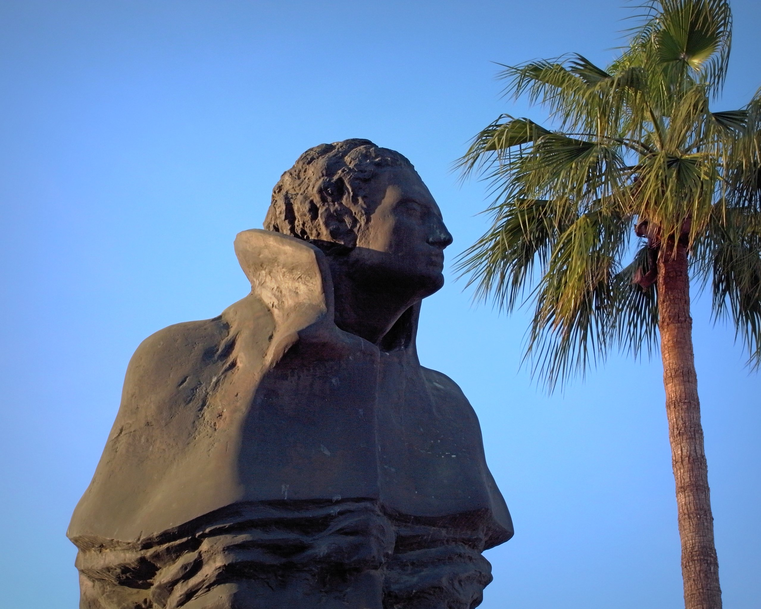 Joan Salvat-Papasseit. Puerto de Barcelona.